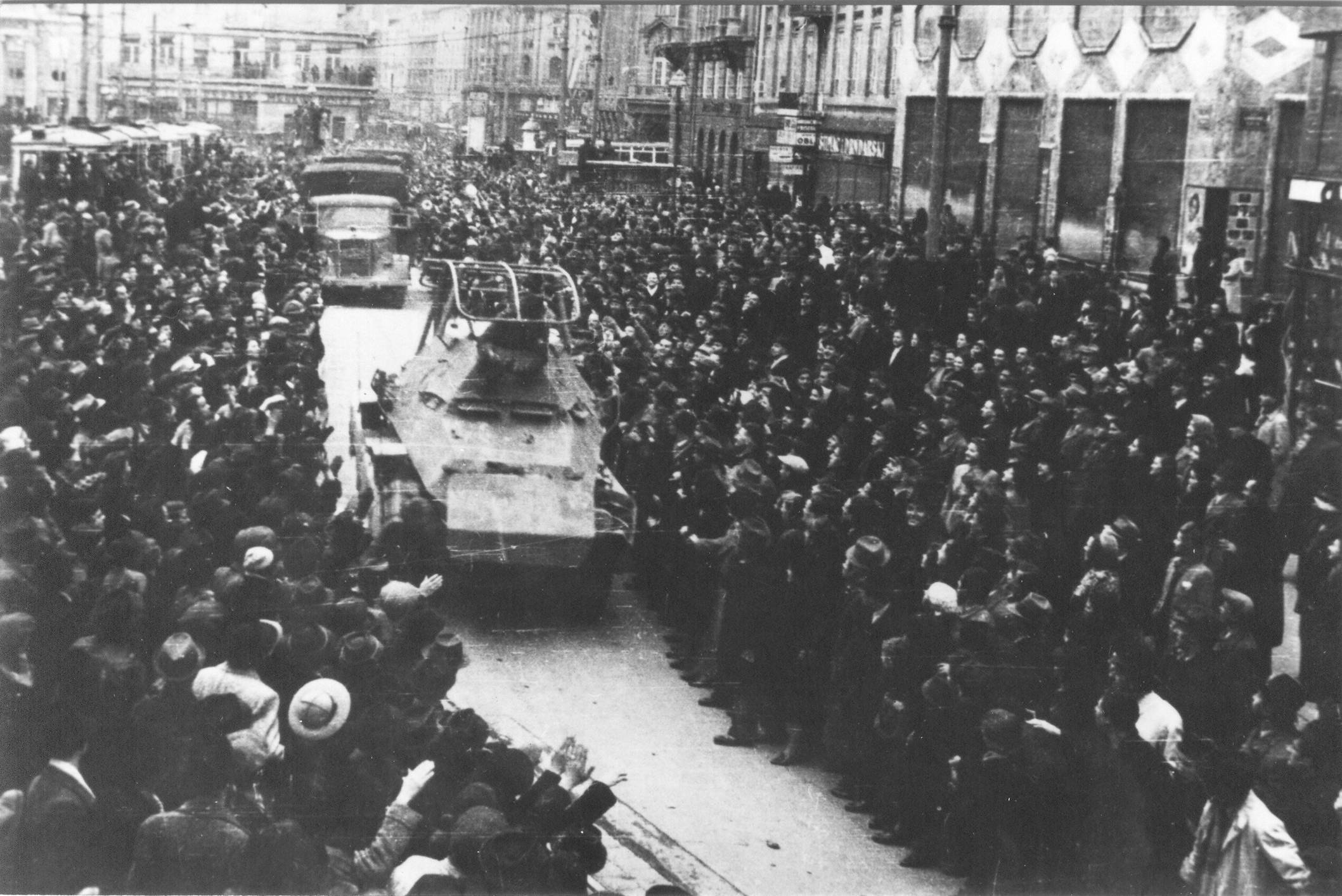 Prihod nemških čet v Zagreb